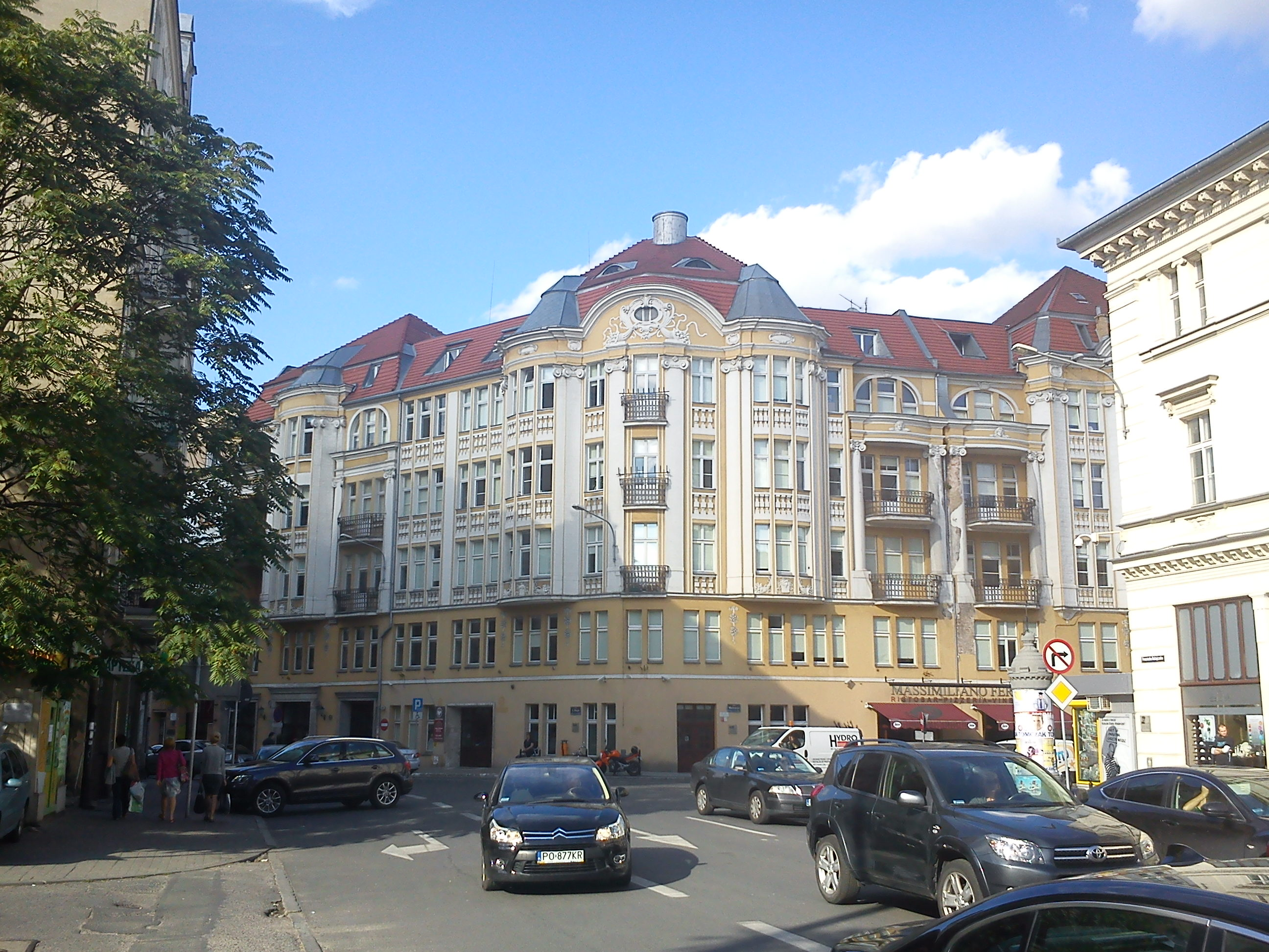 Poznań, Plac Wolności 14 / róg ul. 3 Maja 46 - neobarokowy gmach Towarzystwa Union projektu Rogera Sławskiego, 1910 (zabytek nr A 418)